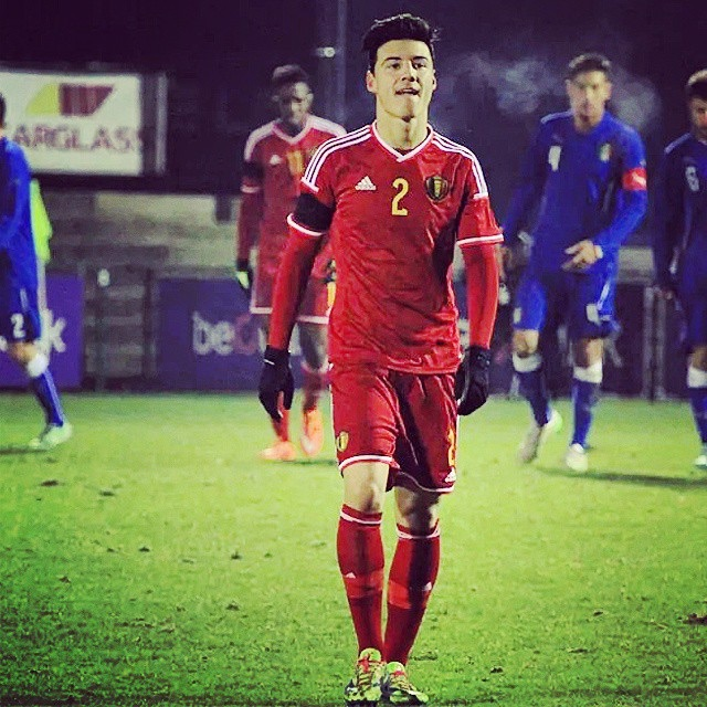 Dion Cools